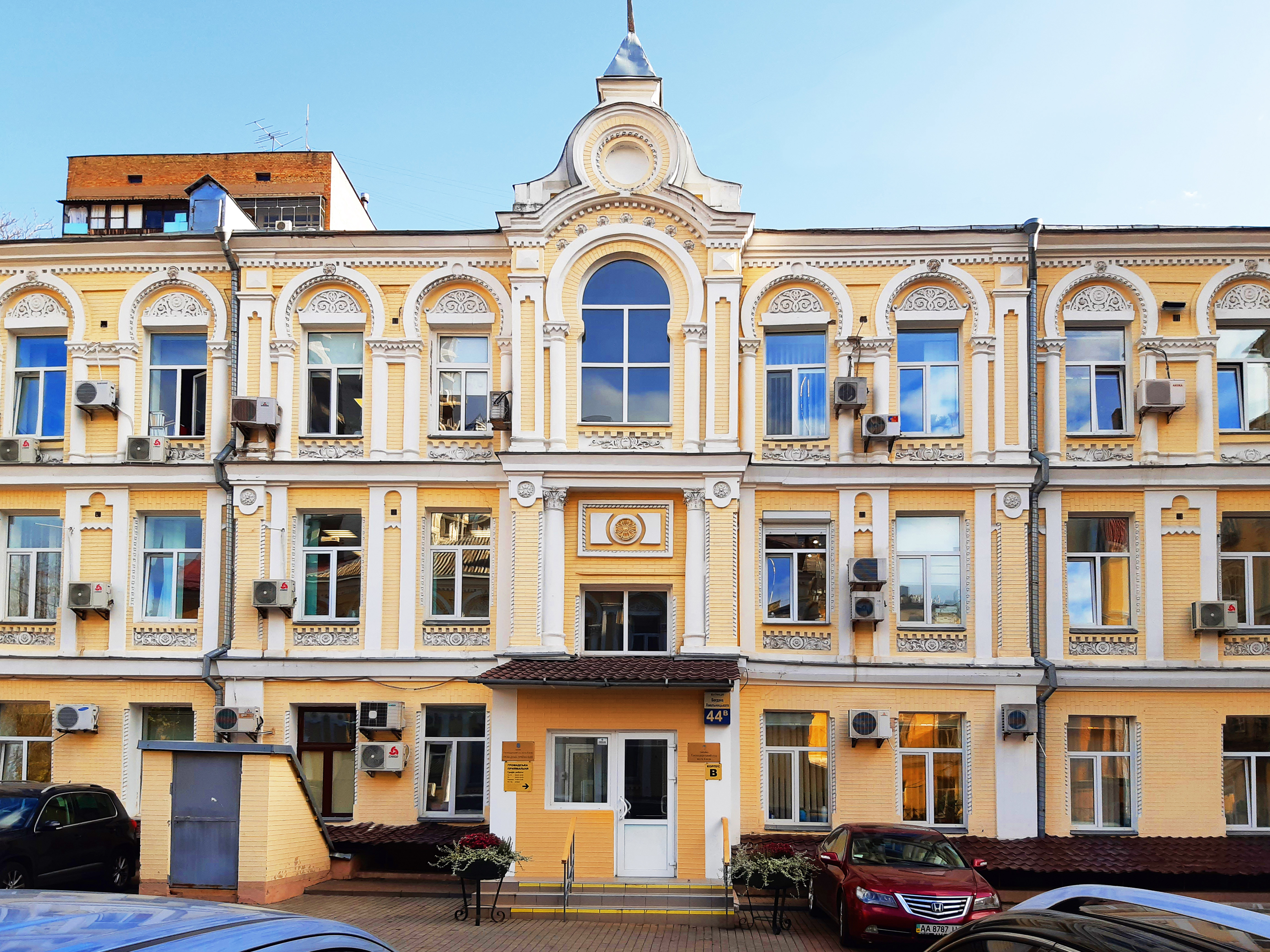 Флігель, Садиба Шампаньєра. Київ, вул. Богдана Хмельницького, 44-В